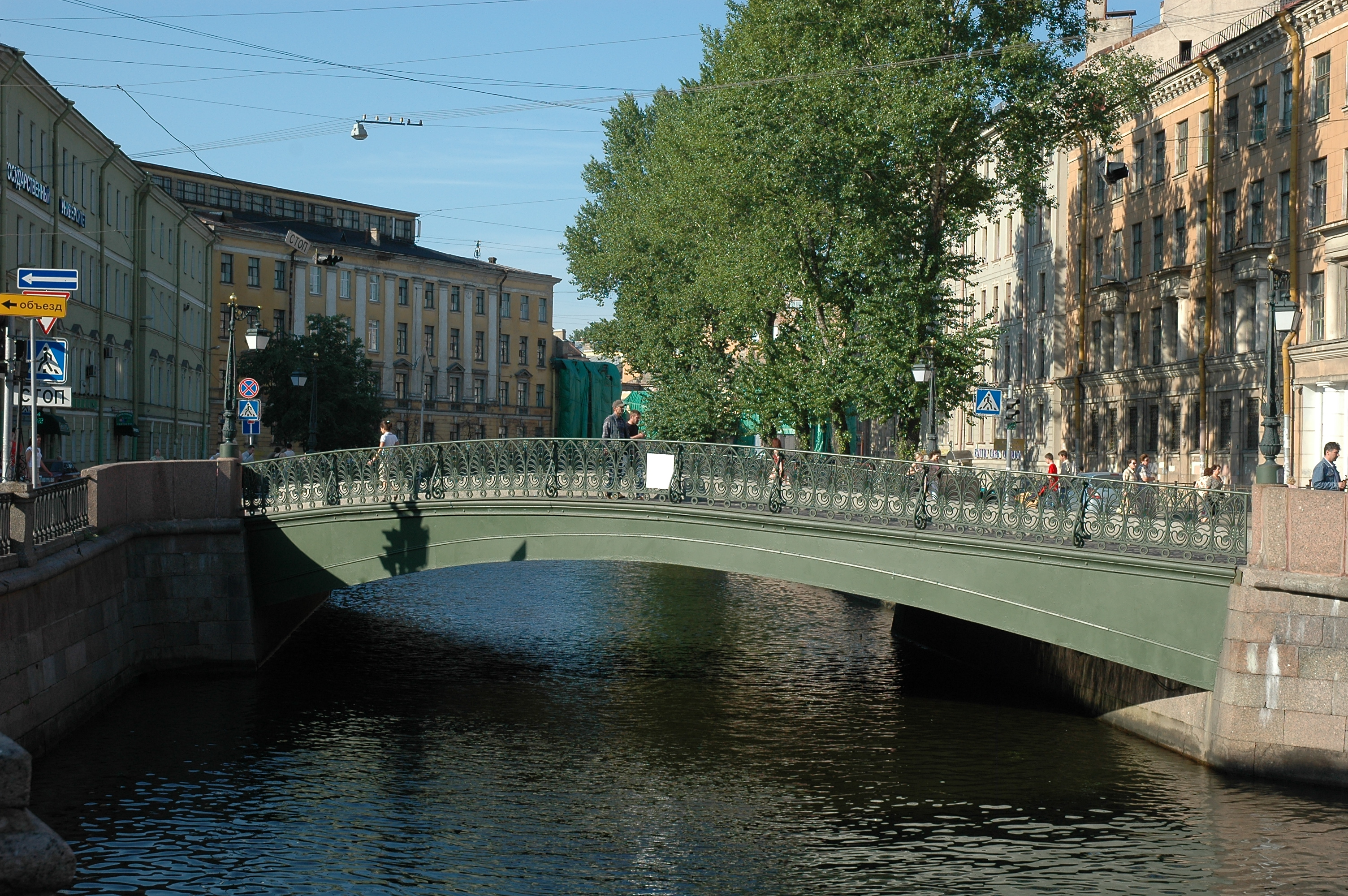 Demidov bridge across Griboedova canal, St Petersburg